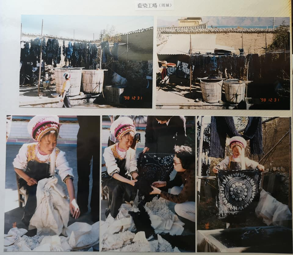 雲南省大理村周城の藍染（絞り染め）工場 1998年